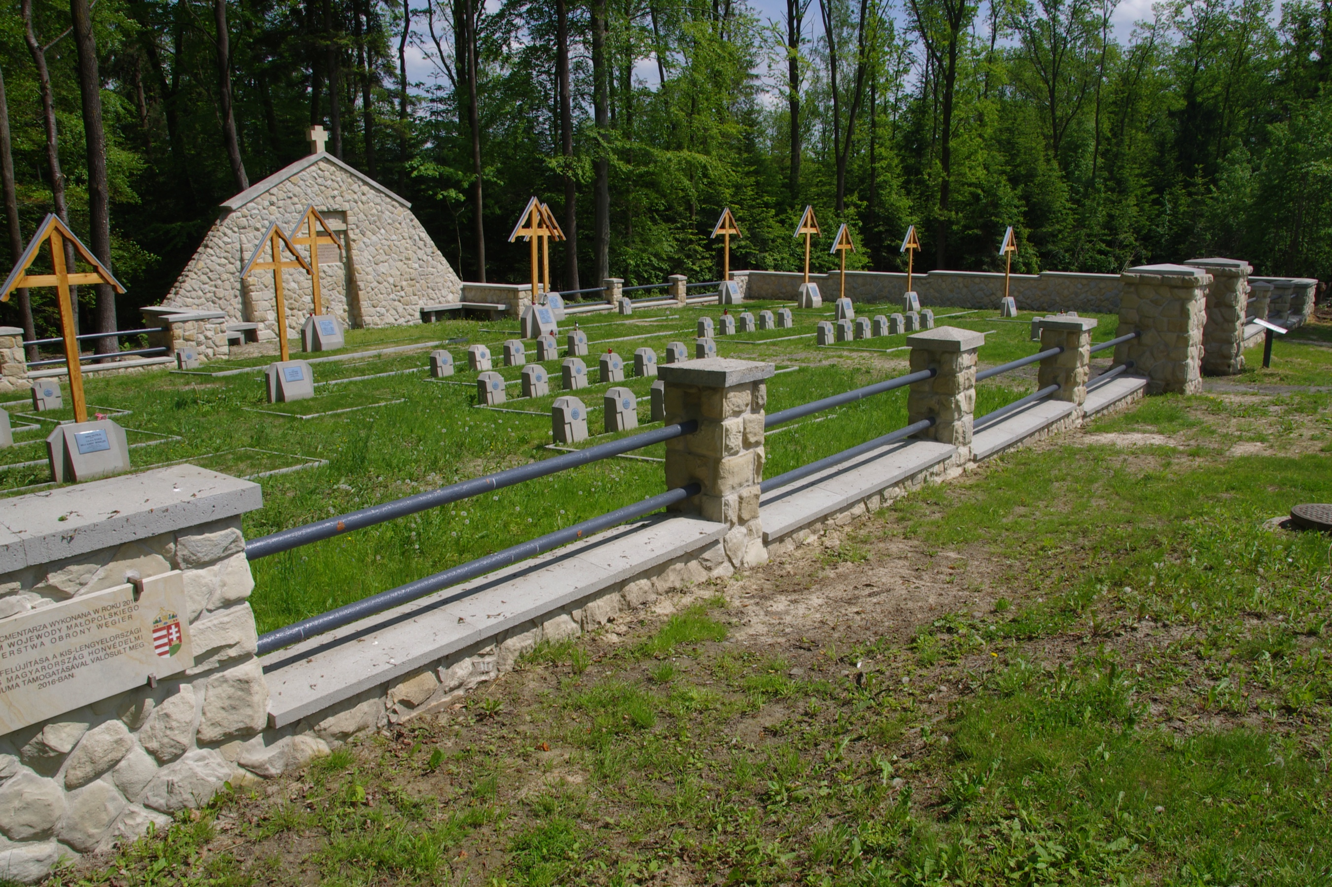 Cmentarz wojenny nr 121 Biesna